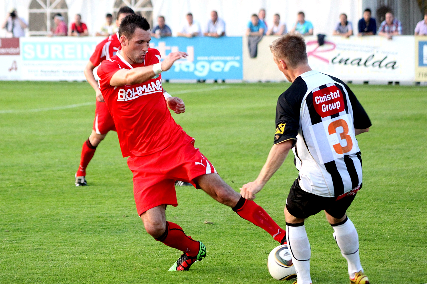 Relegationsspiel um den Aufstieg in die Erste Liga: SC-ESV Parndorf 1919 (rote Trikots) gegen Wolfsberger AC/SK St. Andrä 1:0 (1:0) → Für die Spielernamen bitte mit der Maus über das Bild fahren